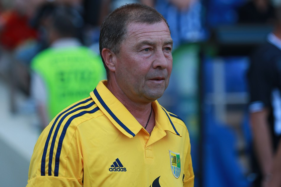 Владимир Линке во время участия в матче 25-летия кубка СССР